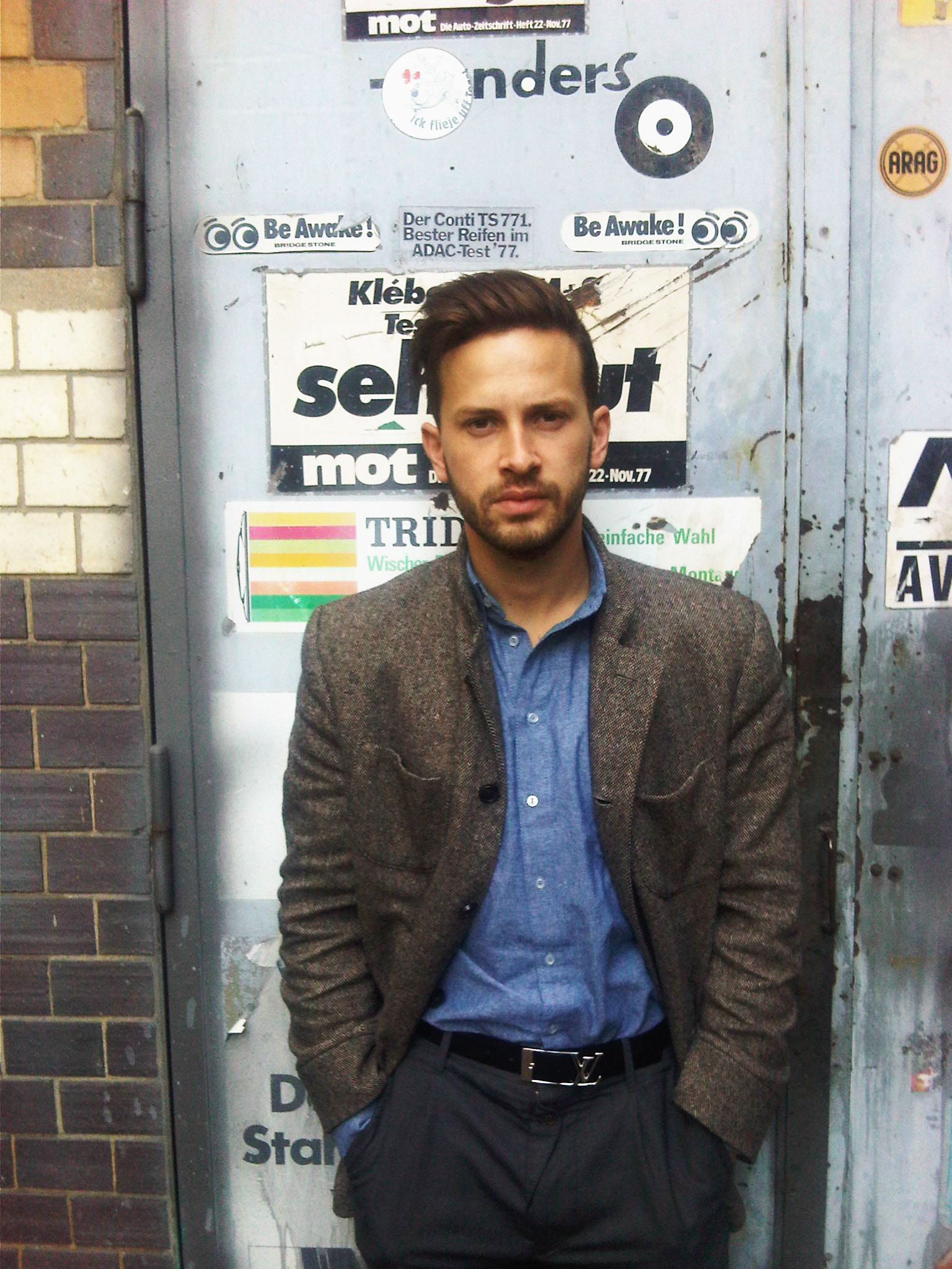 Der deutsche Schauspieler Franz Dinda vor seinem Kreuzberger Atelier